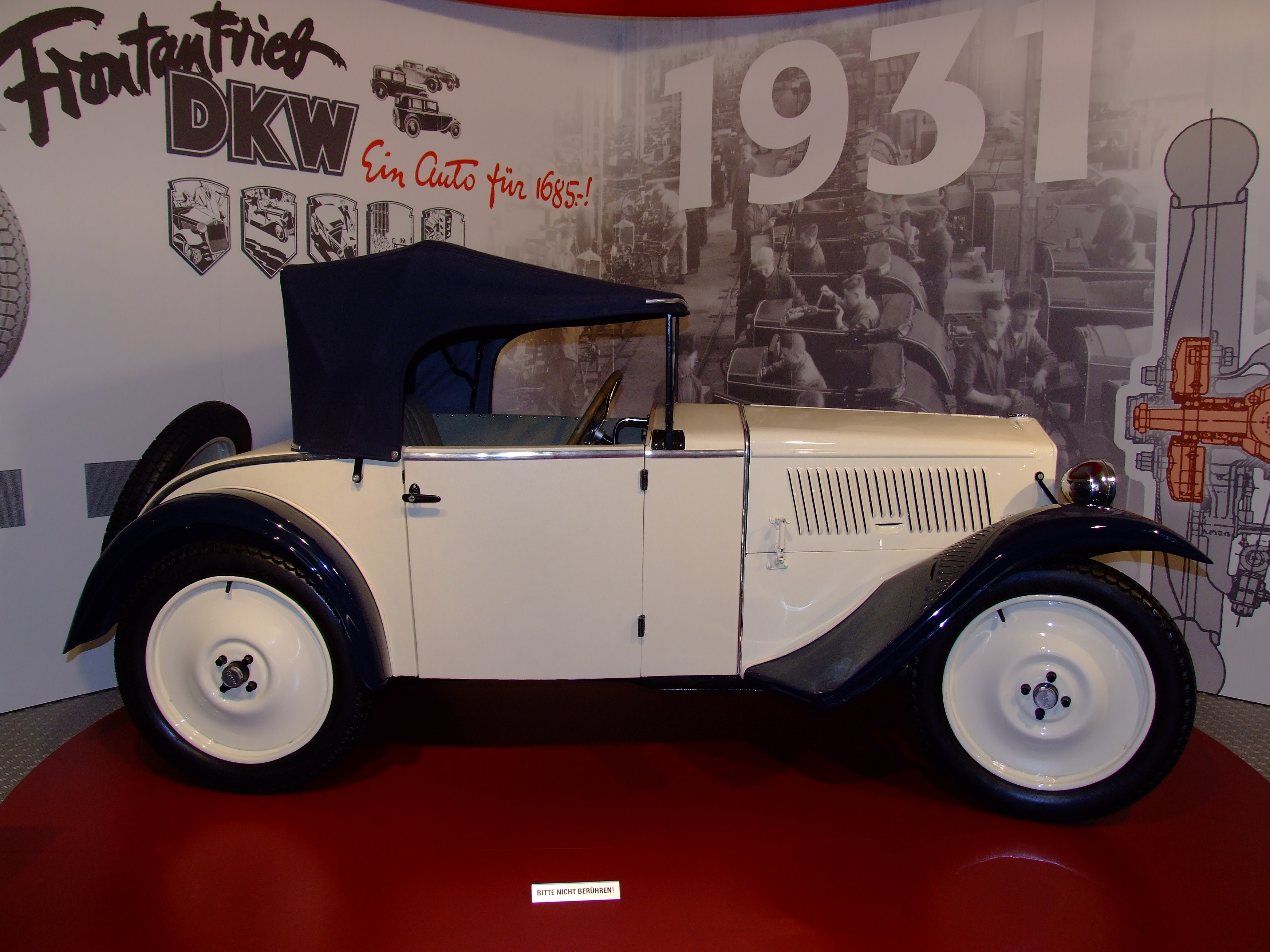 Legendärer DKW F1 Begründer der frontgetriebenen Zweitakter aus Zwickau seite